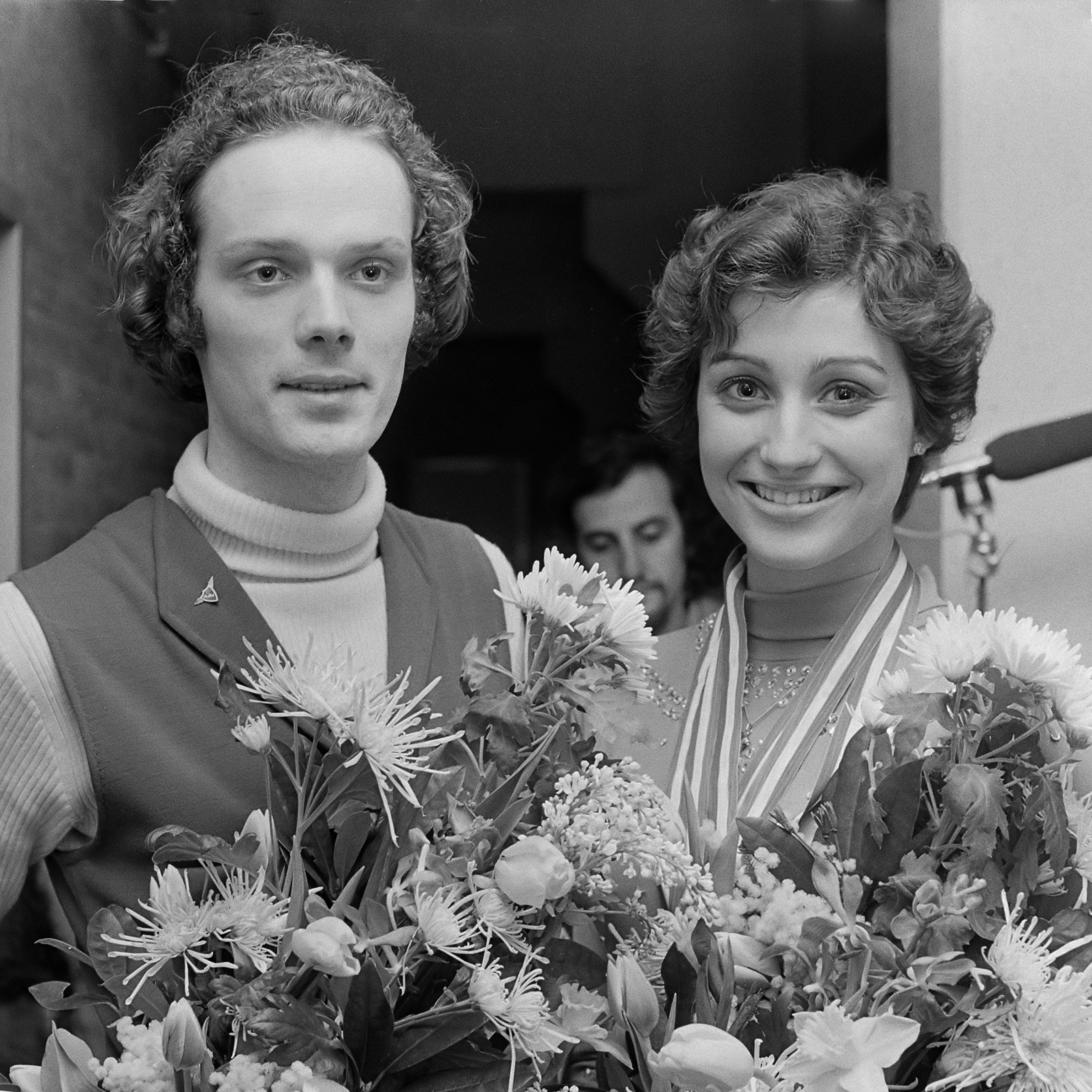 Nederlandse kampioenschappen kunstrijden in Edenhal in Amsterdam; Rob Ouwerkerk (l) en Diane de Leeuw 18 januari 1975